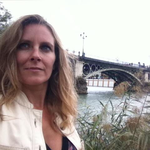 Cristina Martín Jiménez